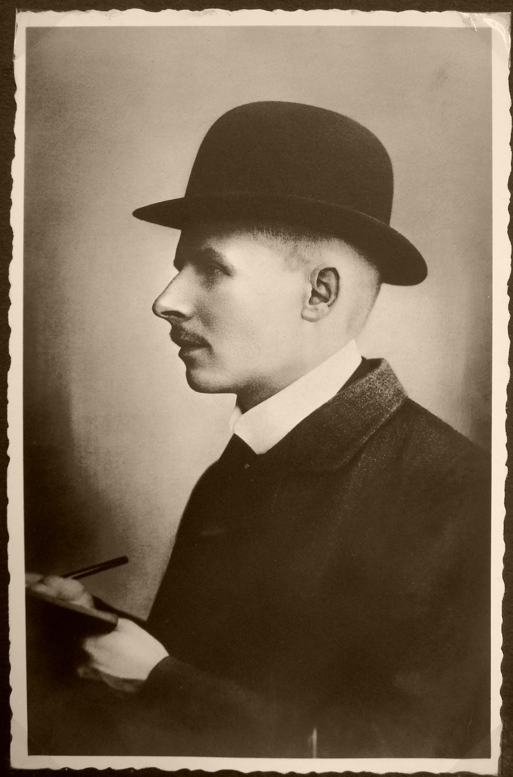 Heinrich Splieth 1900